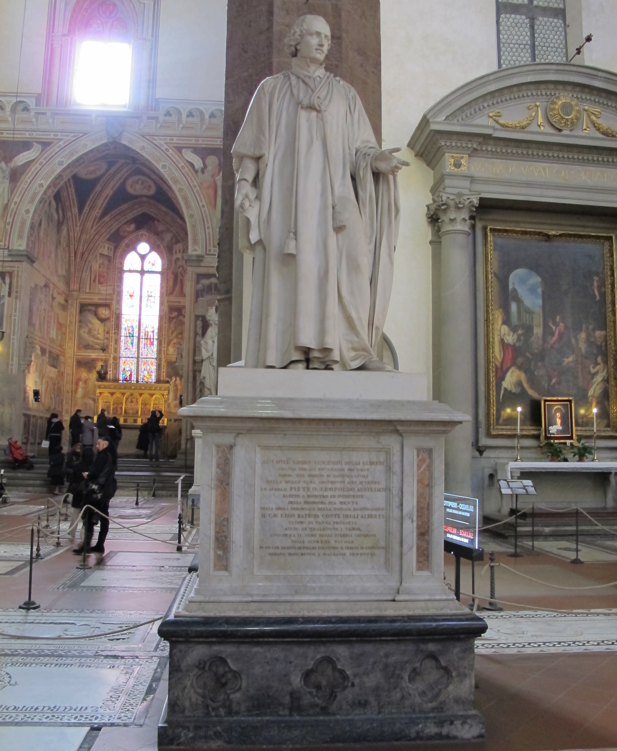 S. croce, tomba giovan vincenzo alberti